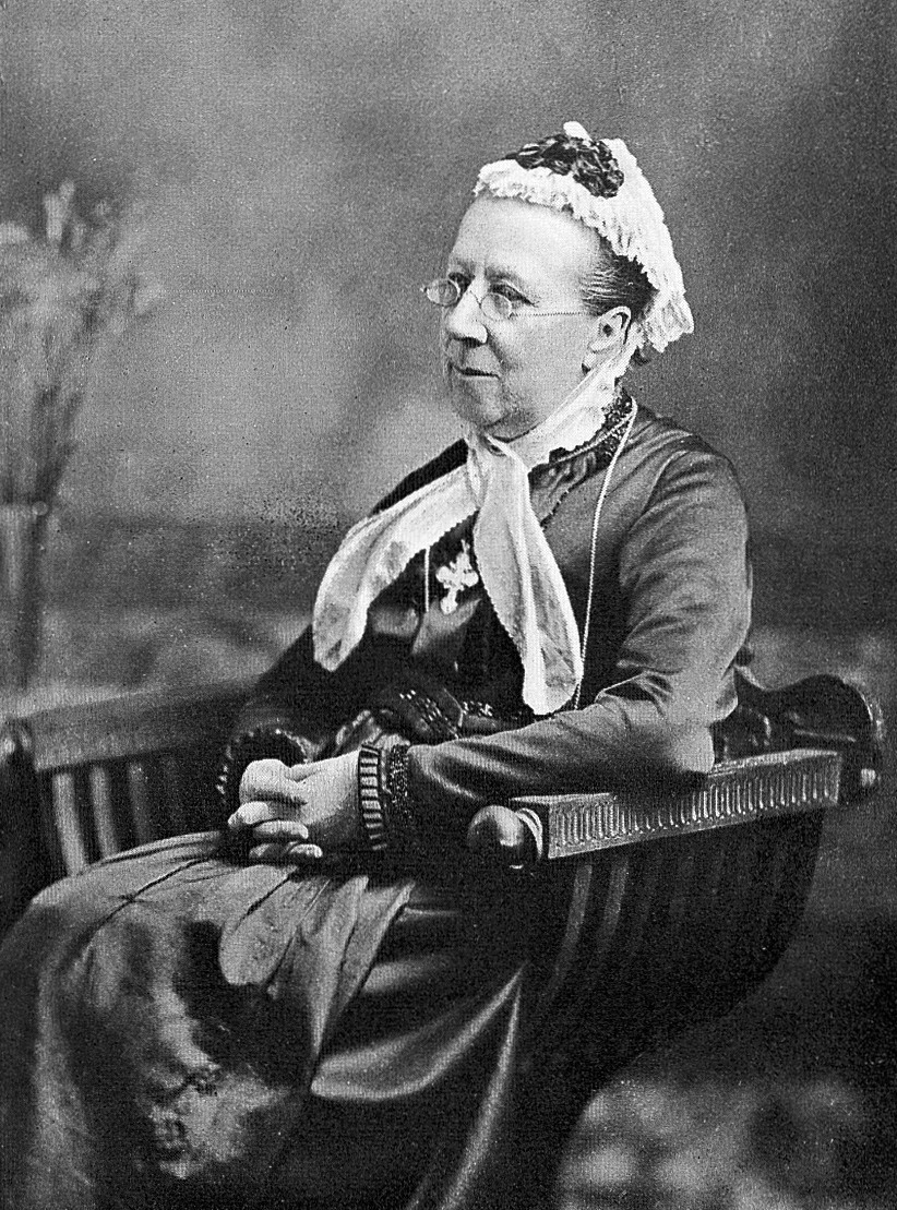 Ernest Abraham Hart